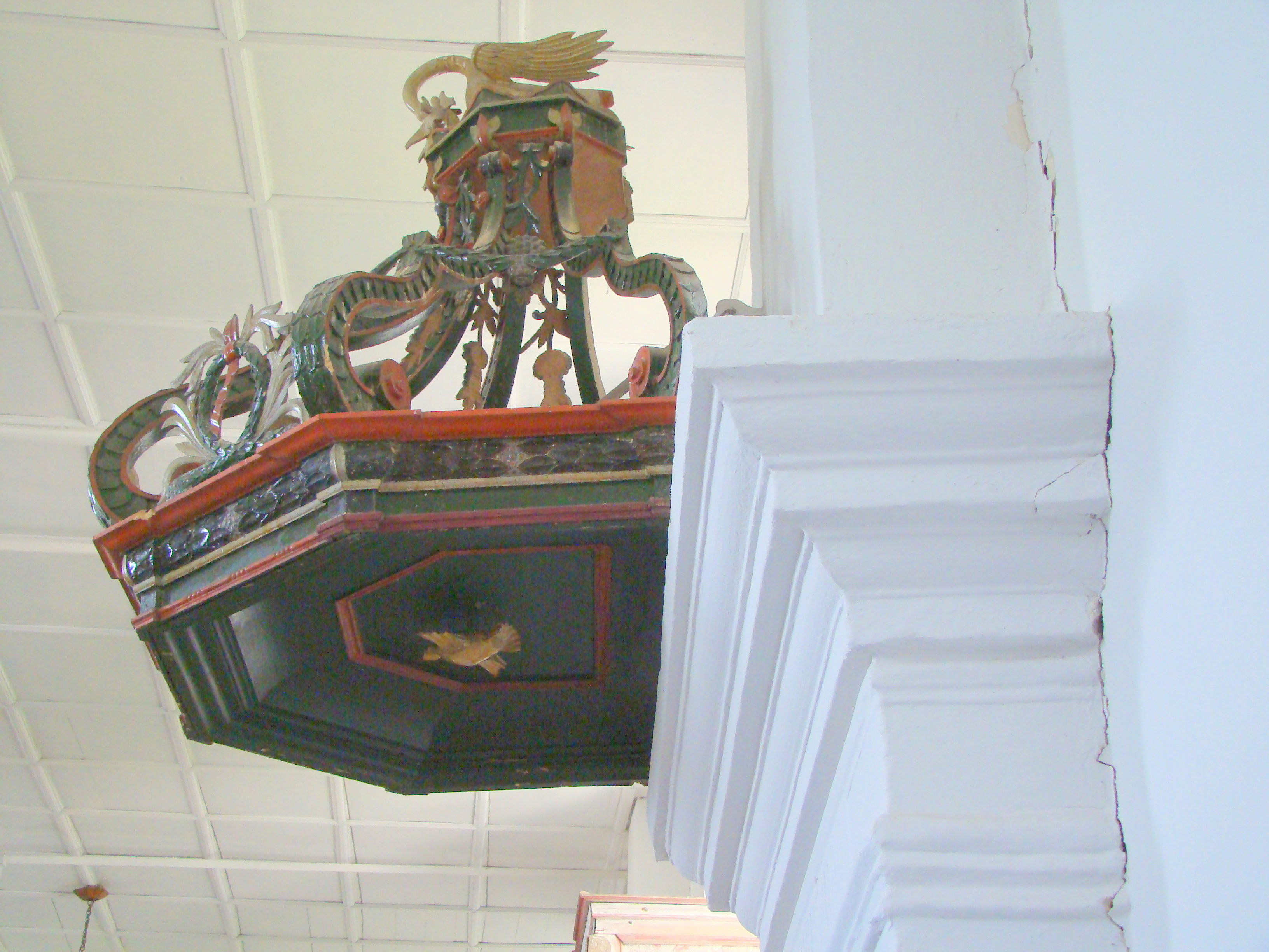 Biserica evanghelică, sat Jimbor; comuna Homorod